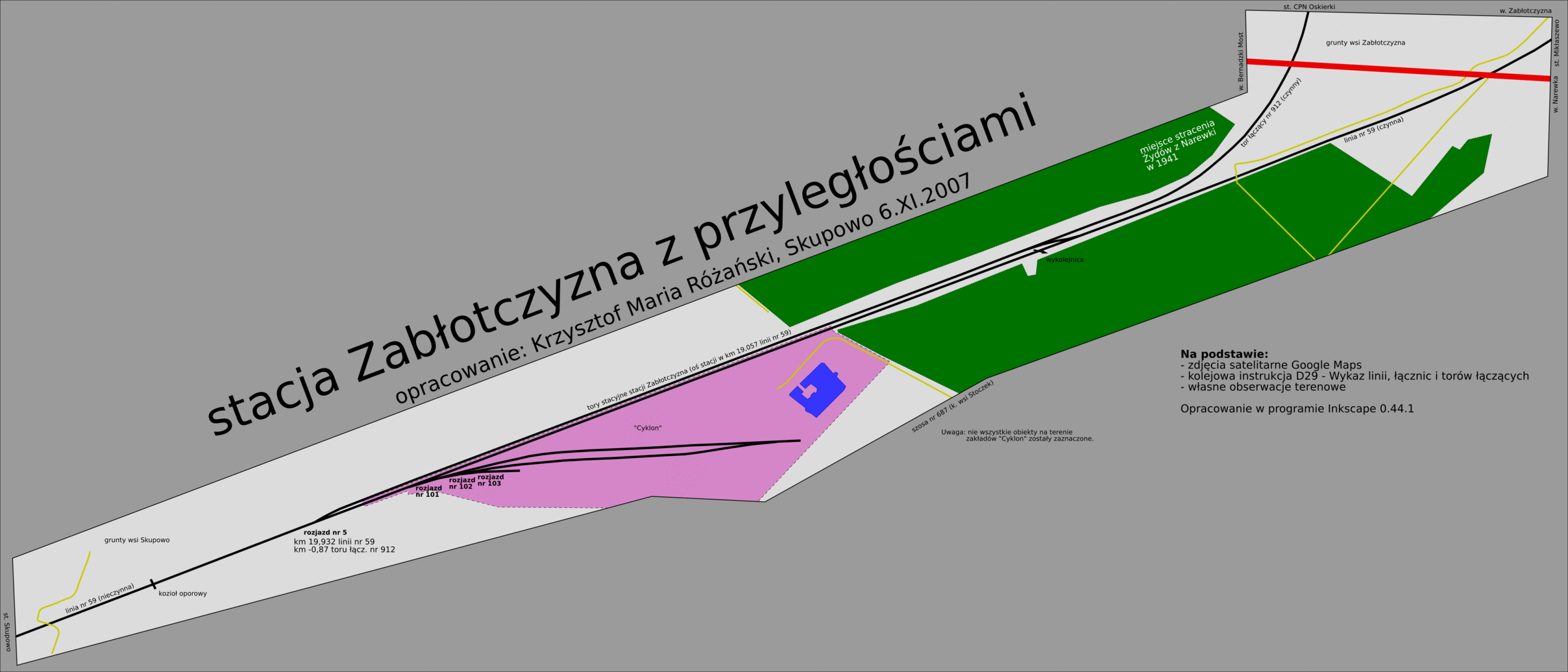 Stacja Zabłotczyzna (szerokotorowa linia nr 59) z przyległościami. Wersja uaktualniona.